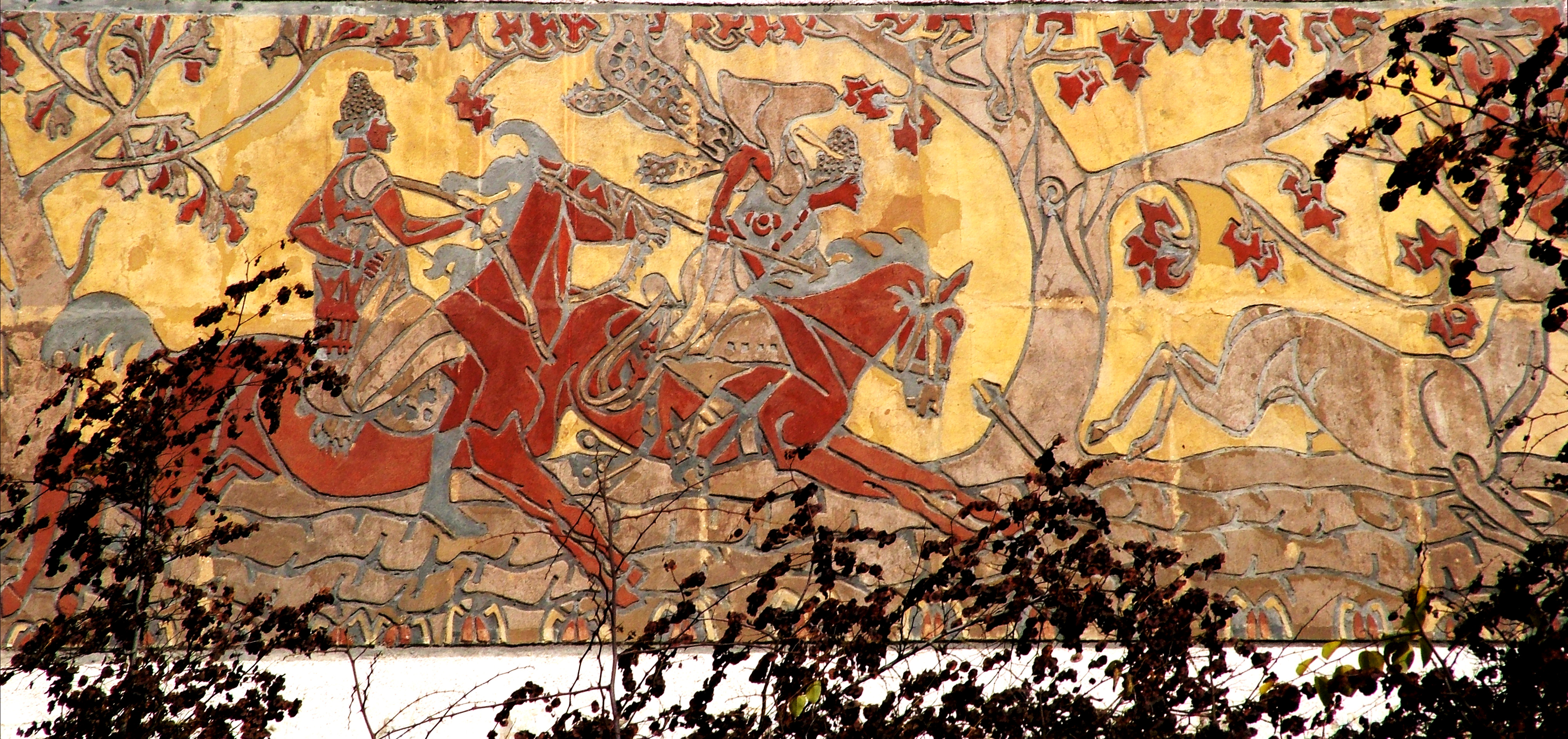 Nagy Sándor (1909): A Csodaszarvas üldözése (a veszprémi Petőfi színház falán)